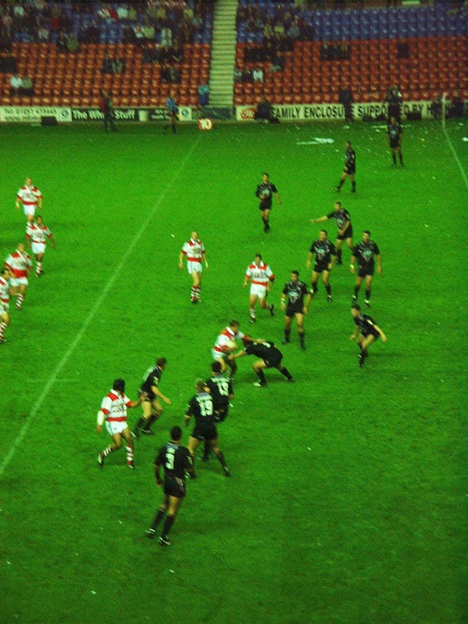 Rencontre entre St Helens et Wigan Warriors en Super League (rugby à XIII)